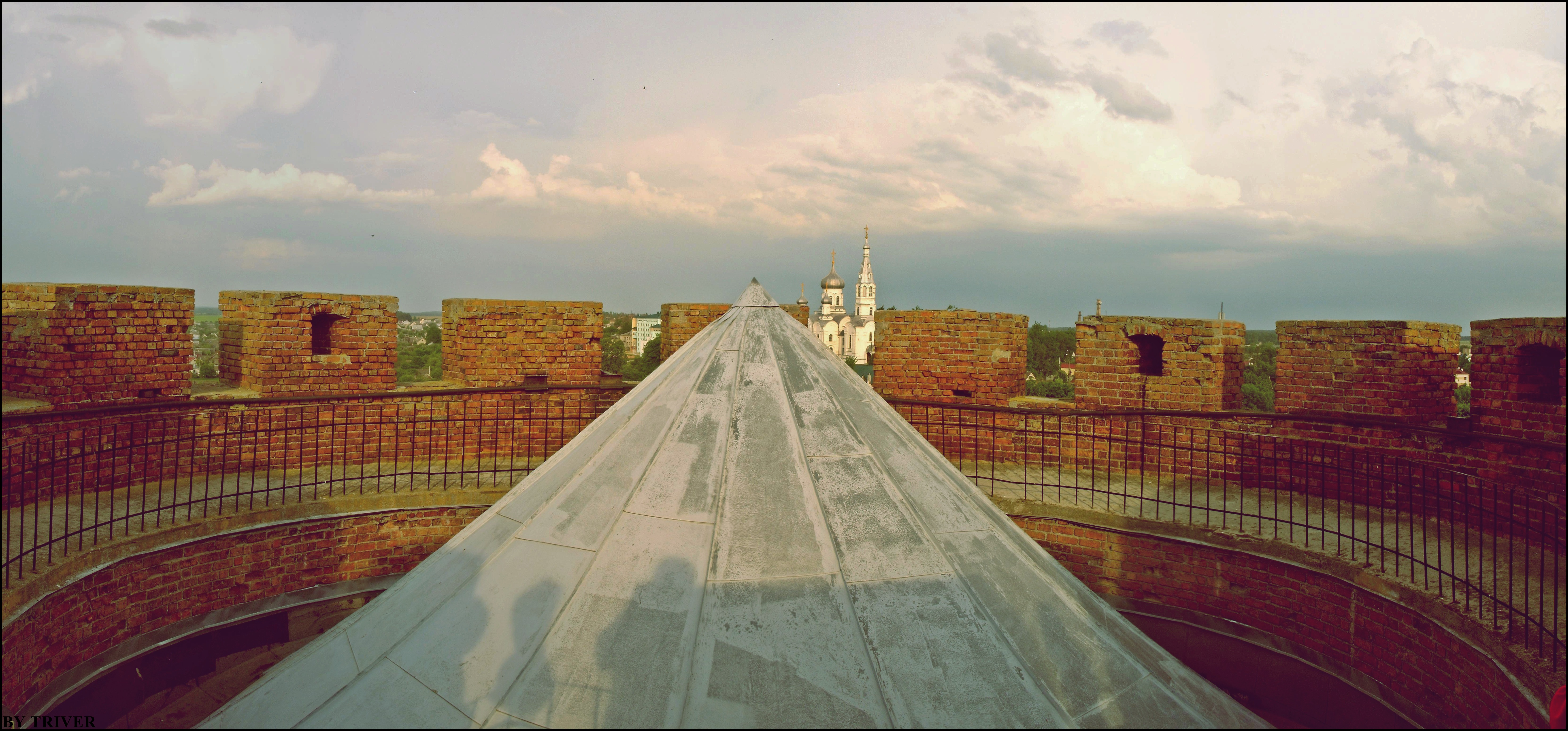 Купал